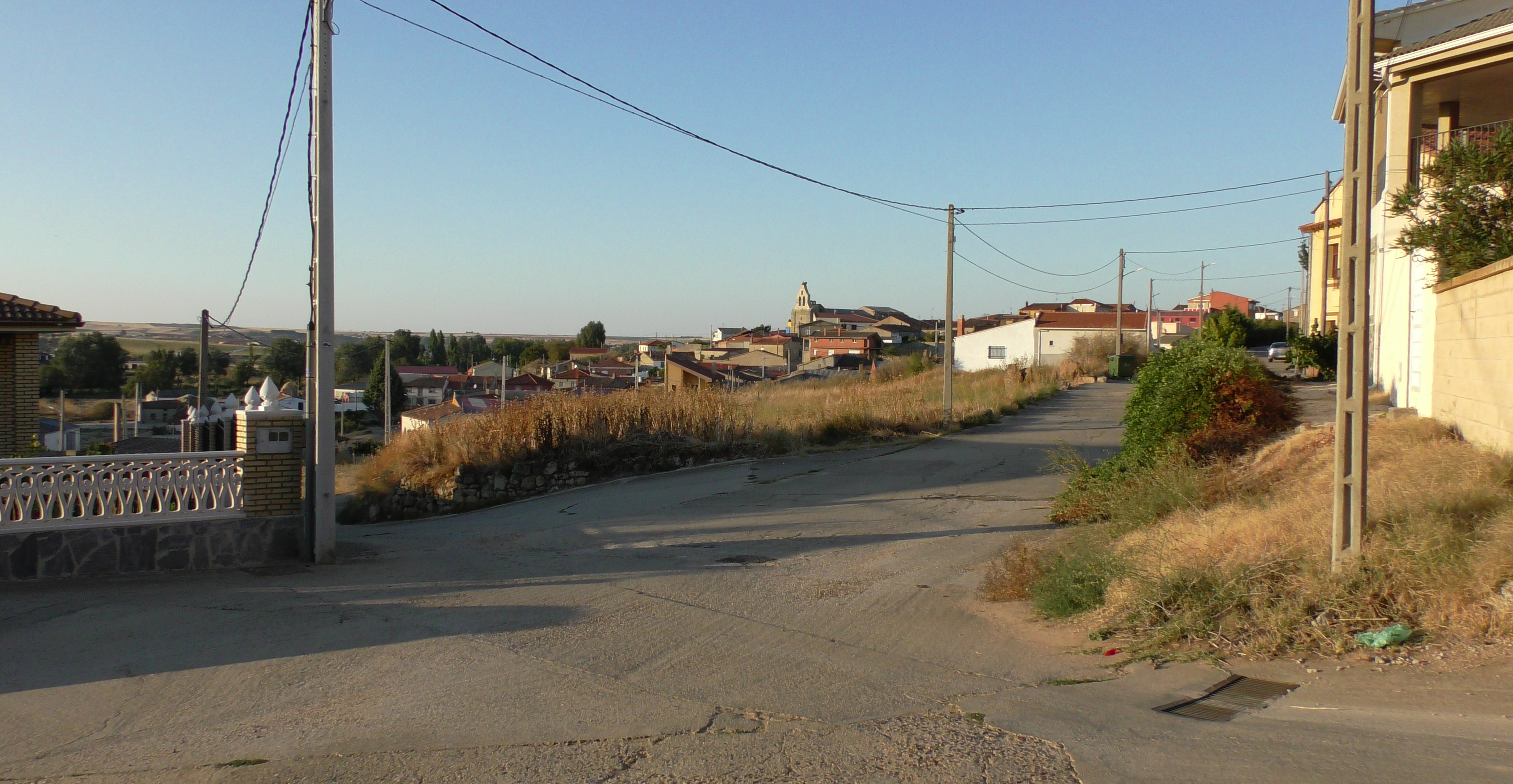 San Miguel de la Ribera